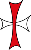 GNU-FDL Erstellt von John Eff 20:50, 30. Jun 2004 (CEST)